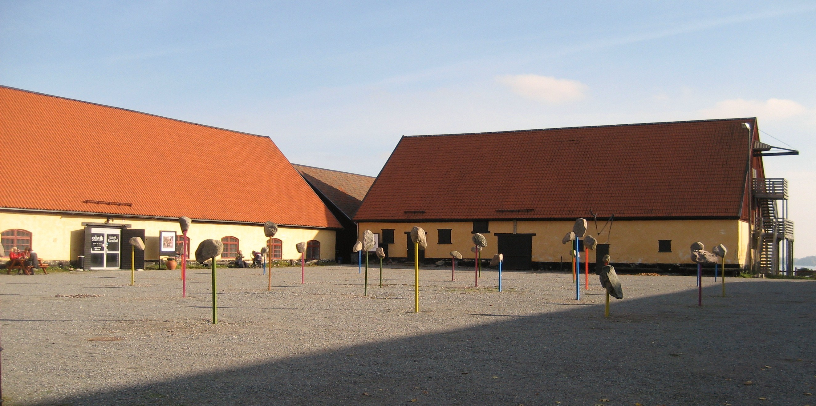 Edsviks konsthall på Edsbergs slott, Sollentuna.